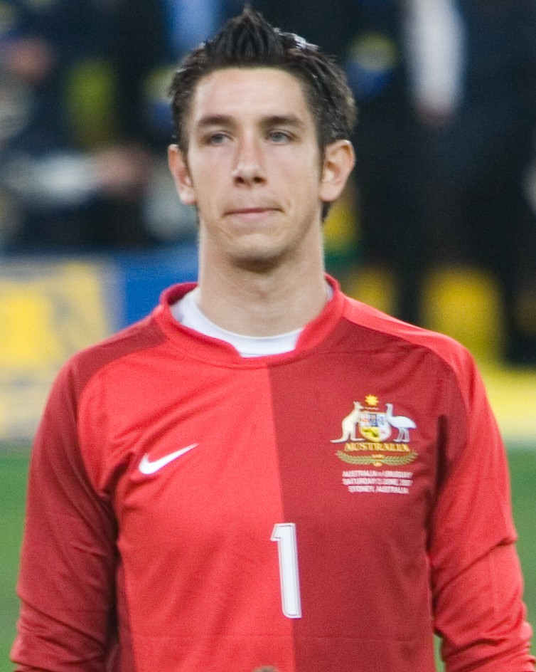 برادلي جونز.